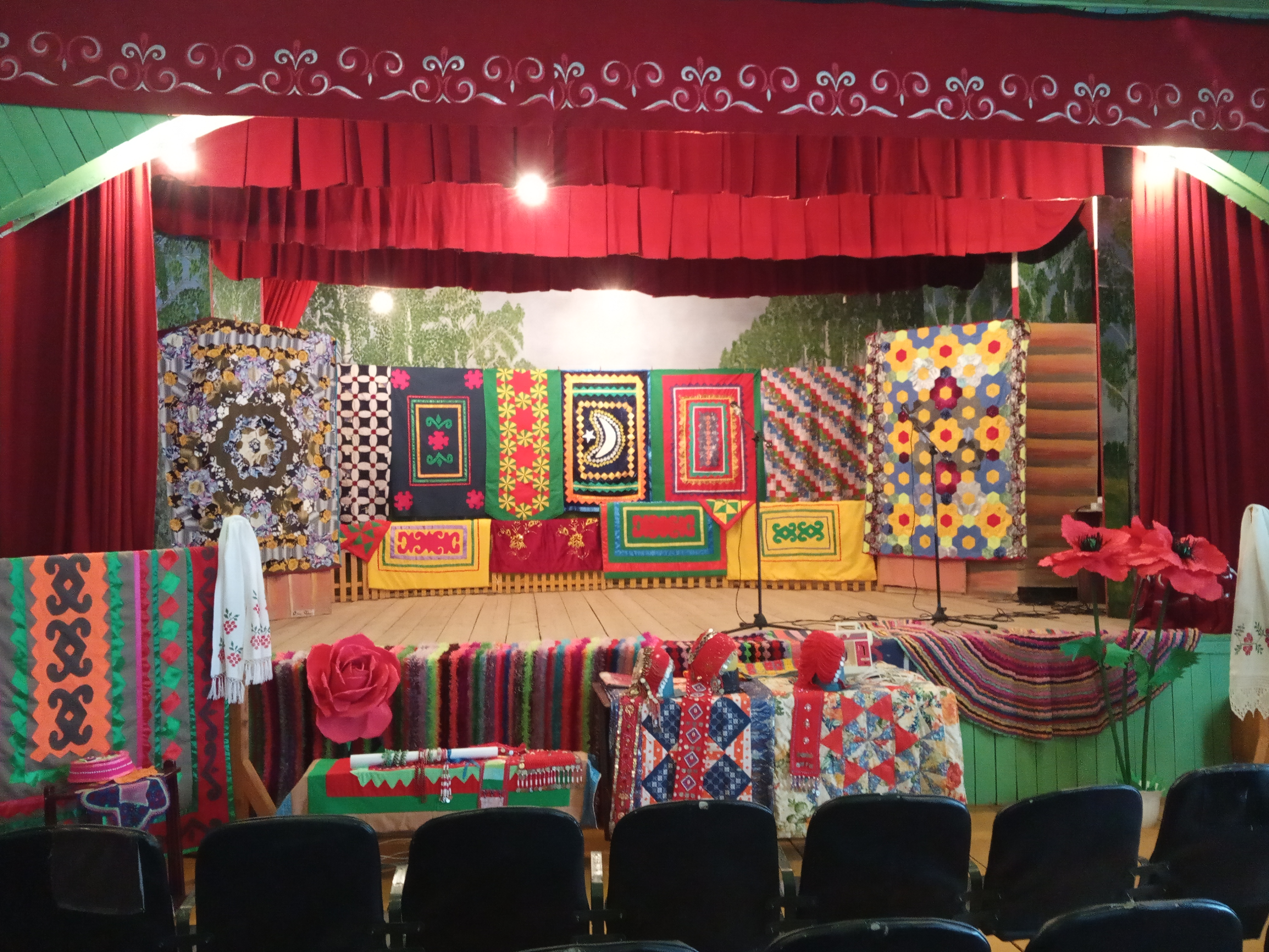 Сельский дом культуры деревни Атиково Бурзянского района